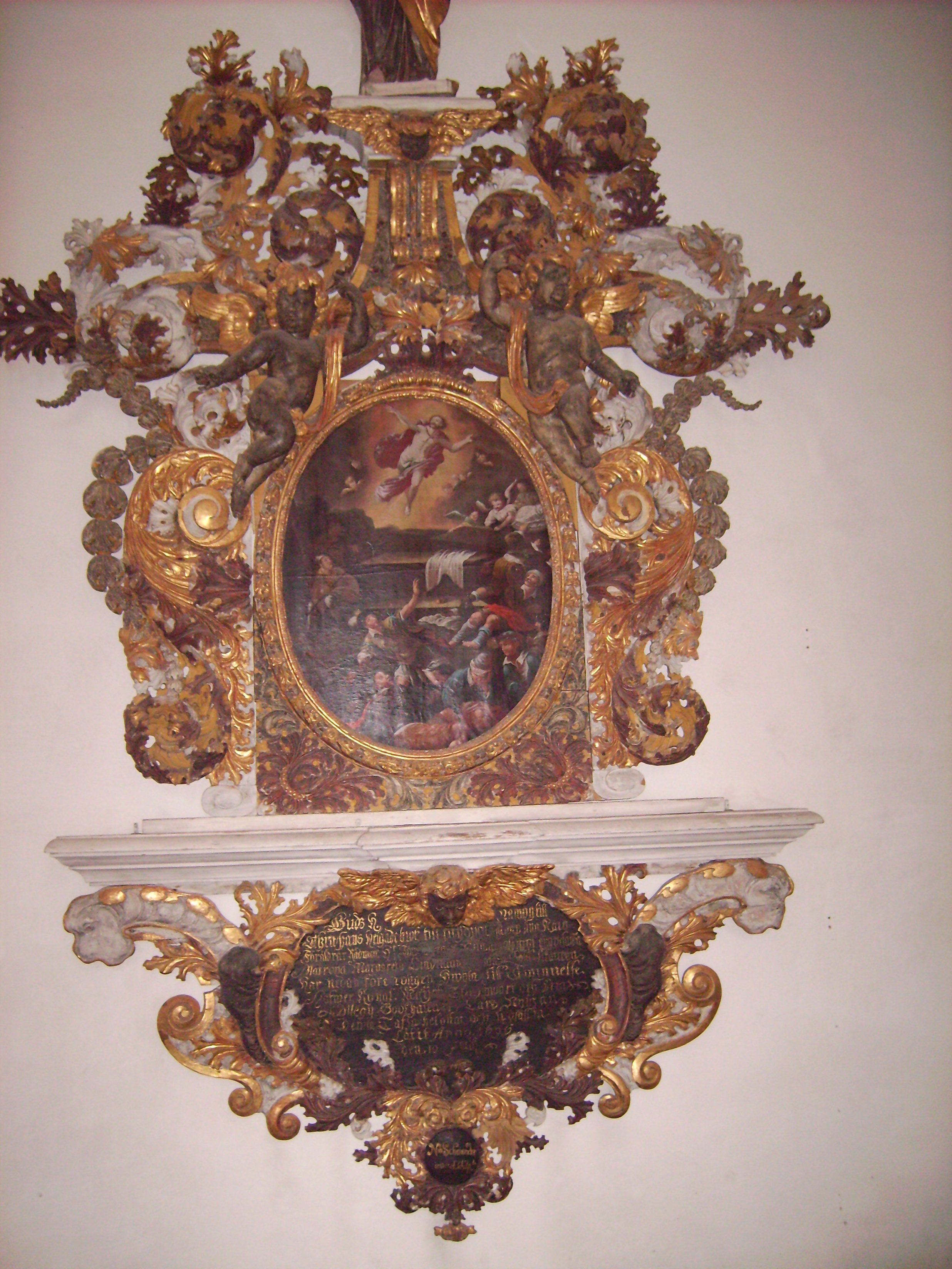 The Middle Age church ”Vårfrukyrkan” in Skänninge, built around 1300 by the German population in the town. "Guds H(eliga) namn till Ähra. Hans helgade chor till prydnad samt sina kära föräldrar, Rådman hr Jöns Larsson Nyman samt modern Matrona Margareta Lindeman Håkansdotter, wars lekanmen här nedan saligen hwila. Till åminnelse hafwer Kungl. Majestäts och krigscollegy bokhållare Lars Nyman denna tafla bekostat och uppsätta låtit Anno 1696 den 10 juli. / N. Schenander Inv.et Sculpt. /"